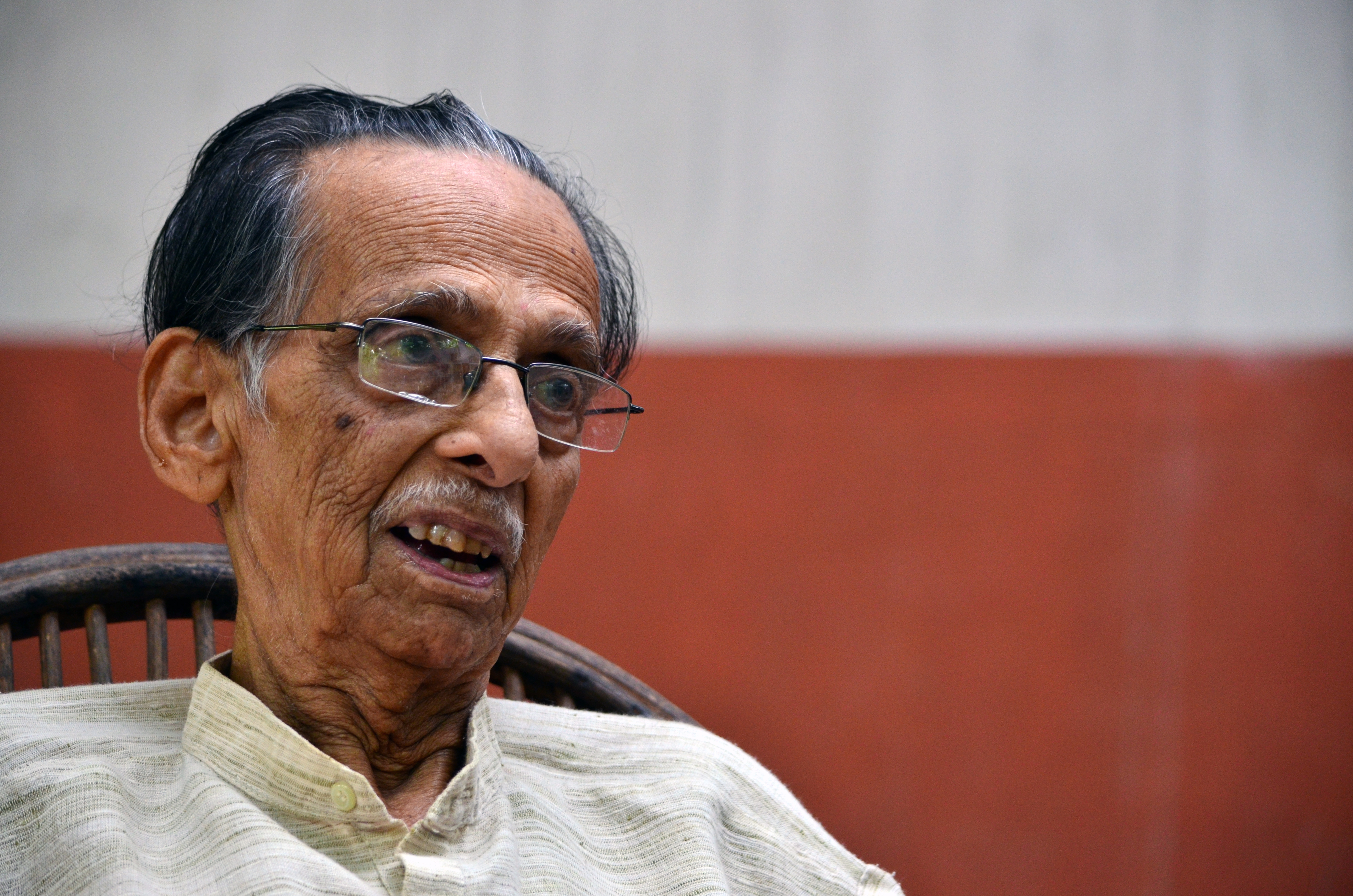 കേരളത്തിലെ സാംസ്കാരിക, സാഹിത്യ മണ്ഡലങ്ങളിൽ ഒട്ടനവധി സംഭാവനകൾ നൽകിയ, ഇപ്പോഴും നൽകിക്കൊണ്ടിരിക്കുന്ന, ഒരു വ്യക്തിയാണു് ശ്രീ കാവാലം നാരായണപ്പണിക്കർ.